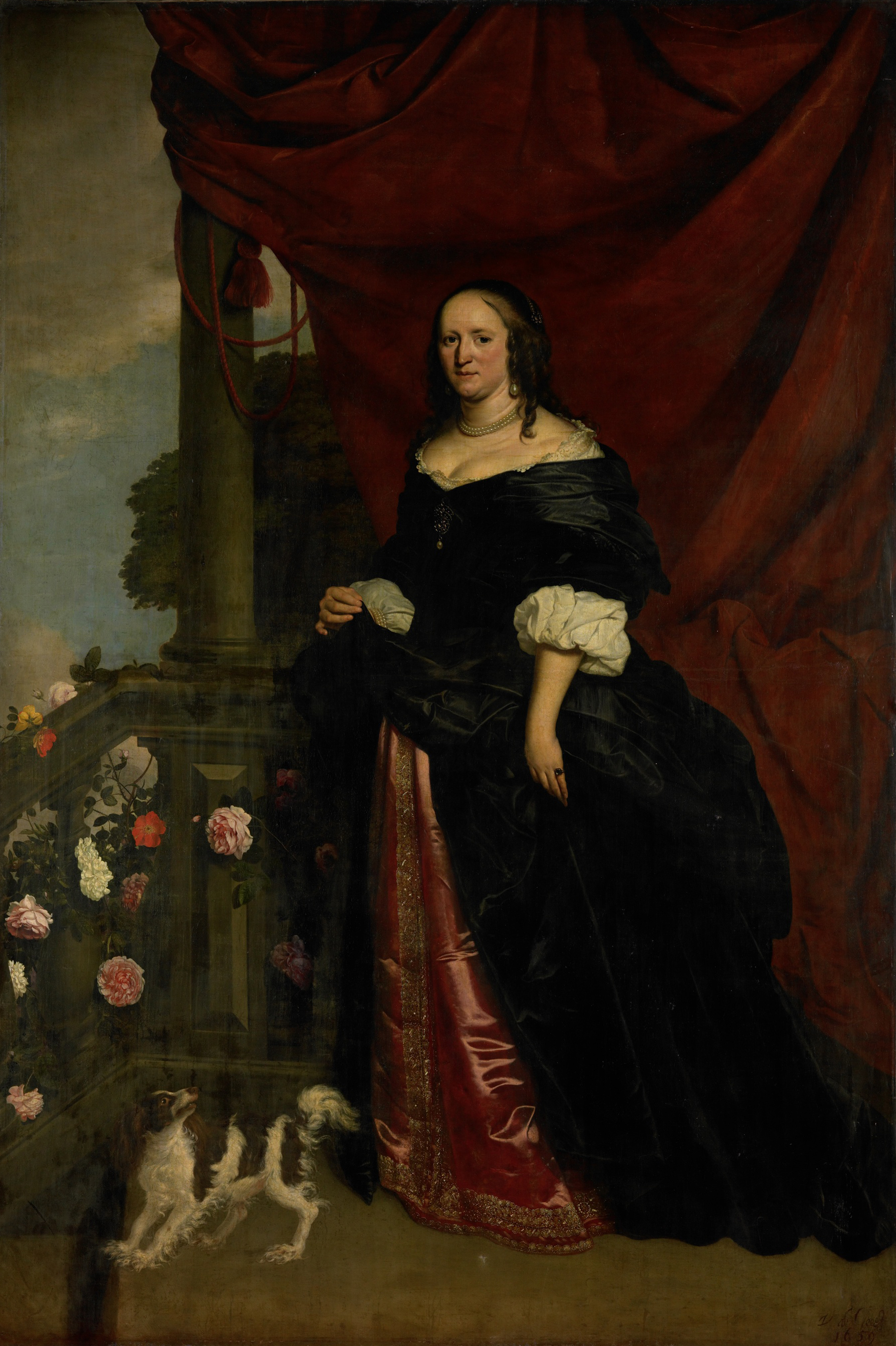 Portret van een aanzienlijke vrouw, vermoedelijk Sophia Anna van Pipenpoy (c. 1618-70), gravin Van Schellart, echtgenote van Johan Albrecht van Schellart. Staande ten voeten uit voor een door rozen begroeide balustrade. Links een hondje. Pendant van het portret van haar echtgenoot in het Musée des Beaux-Arts, Lille.